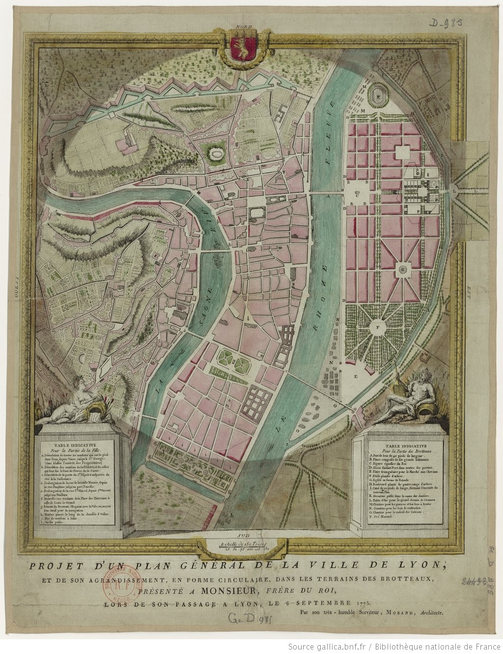 Projet d'un plan général de la ville de Lyon, et de son agrandissement, en forme circulaire, dans les terrains des Brotteaux, présenté à Monsieur, Frère du Roi, lors de son passage à Lyon, le 6 septembre 1775 / par son très humble Serviteur, Morand, architecte